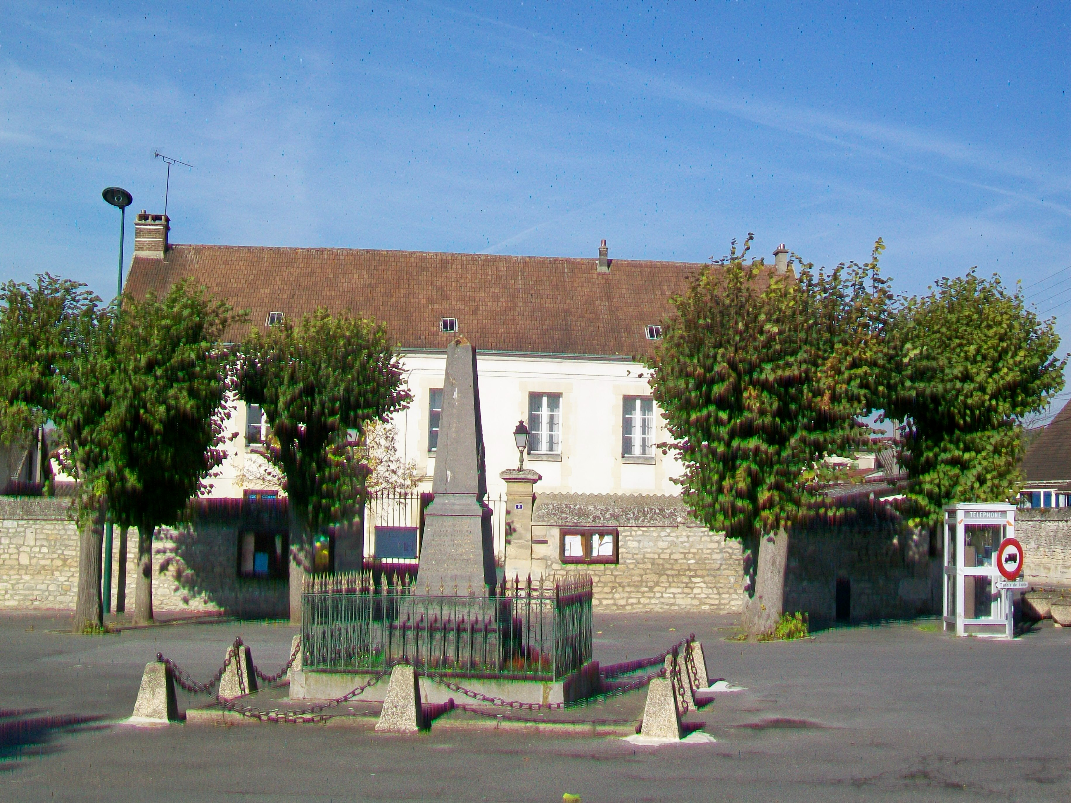 Mairie et monument aux morts, place Henri-Barbusse.